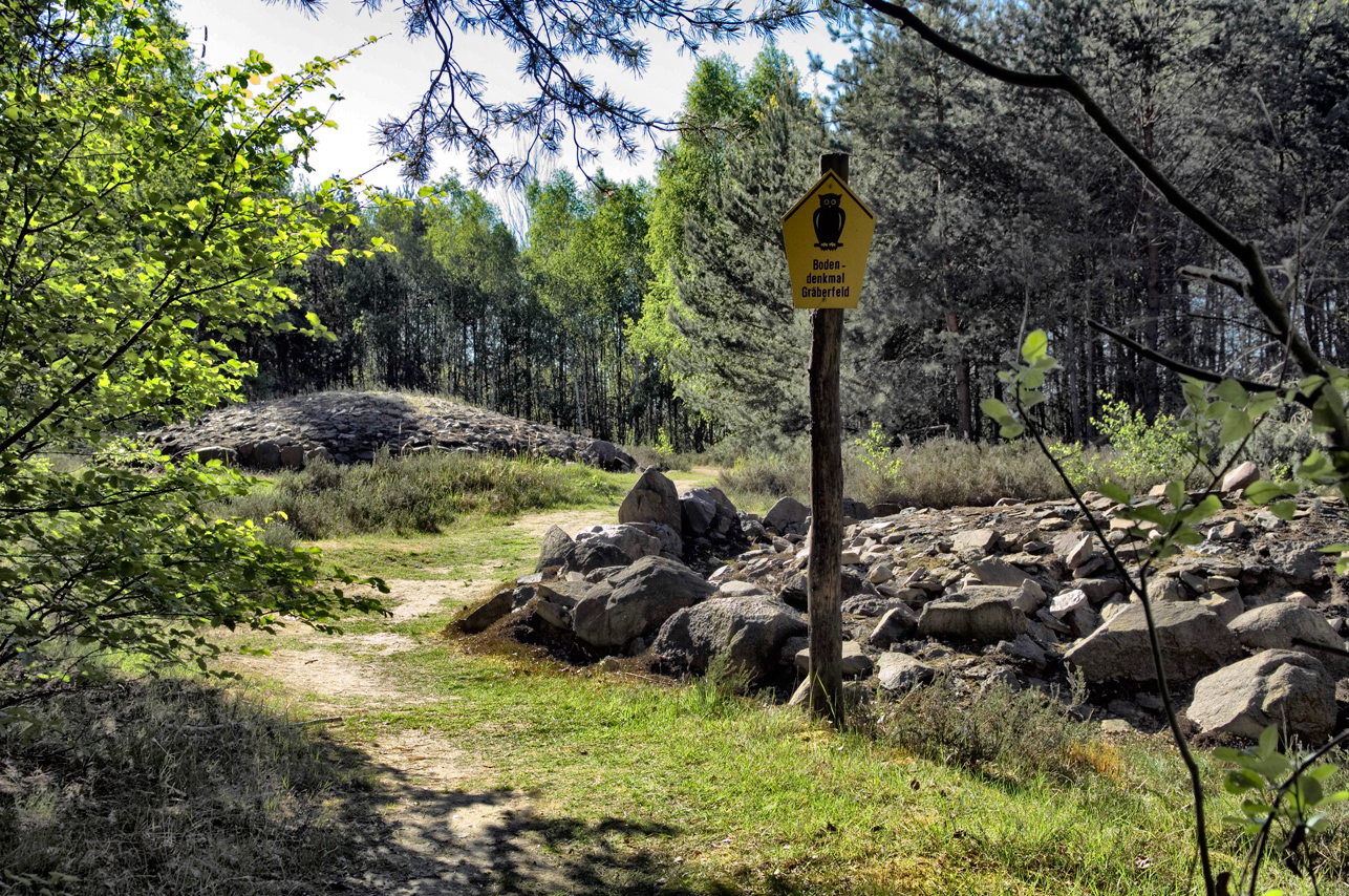 Bronzezeitliche Hügelgräber bei Wüst - Nennewitz bei Wermsdorf